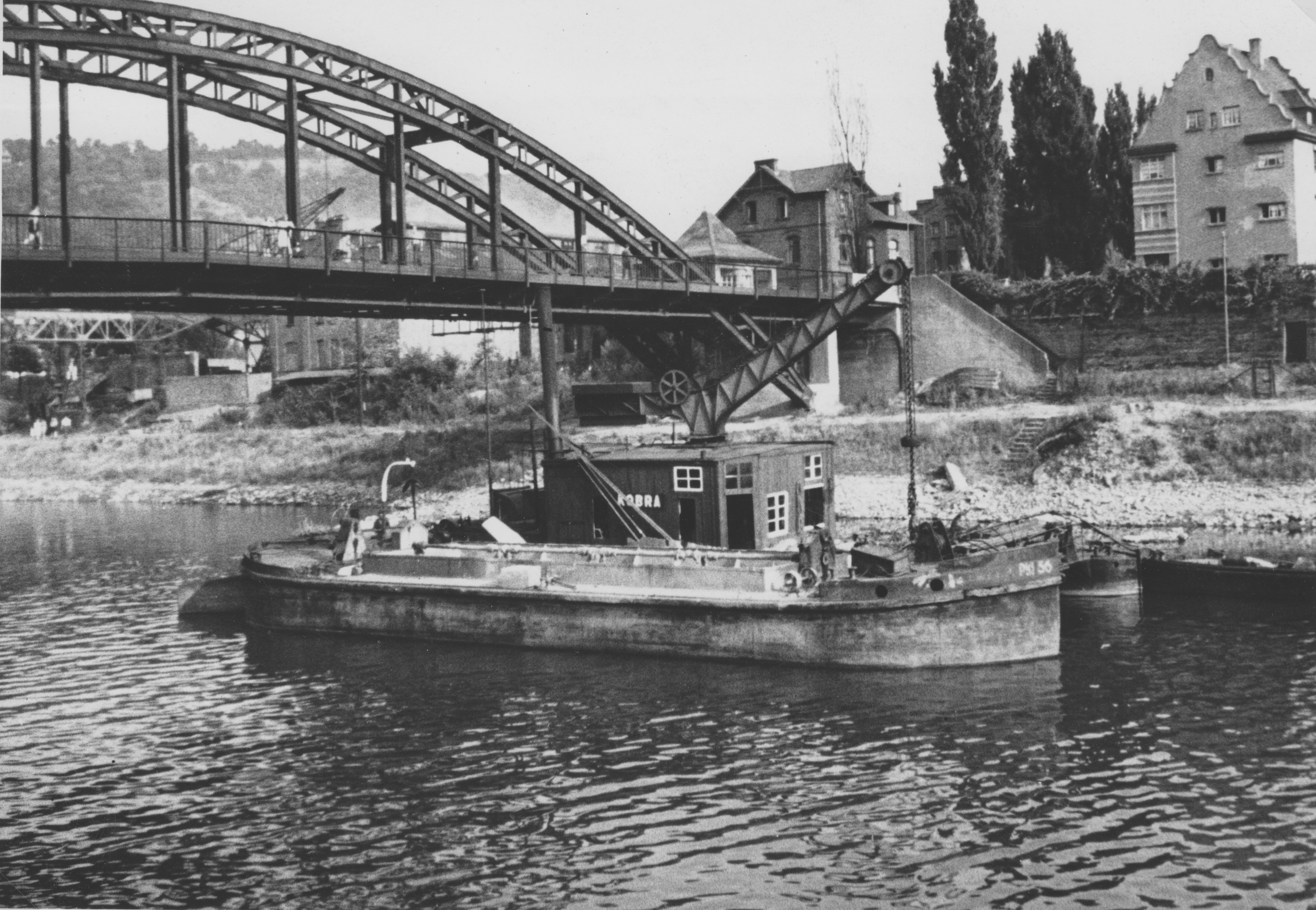 Alte Straßenbrücke Oberlahnstein-Niederlahnstein. Erbaut 1947, nachdem die Vorgängerbrücke von 1927 zum Ende des Zweiten Weltkrieges gesprengt worden war. Die marode Brücke wurde 1992 für den Schwerverkehr gesperrt und 1997 durch den Neubau der Rudi Geil-Brücke ersetzt. Rechts am Brückenende zu erkennen das Brückenhäuschen von der Vorgängerbrücke von 1927 für die Brückenmaut. Originalbeschreibung: "Blick auf die Brücke beim Wiederaufbau nach dem 2. Weltkrieg und das Kranschiff Kobra, das Schutt der zerstörten Brücke abräumt"